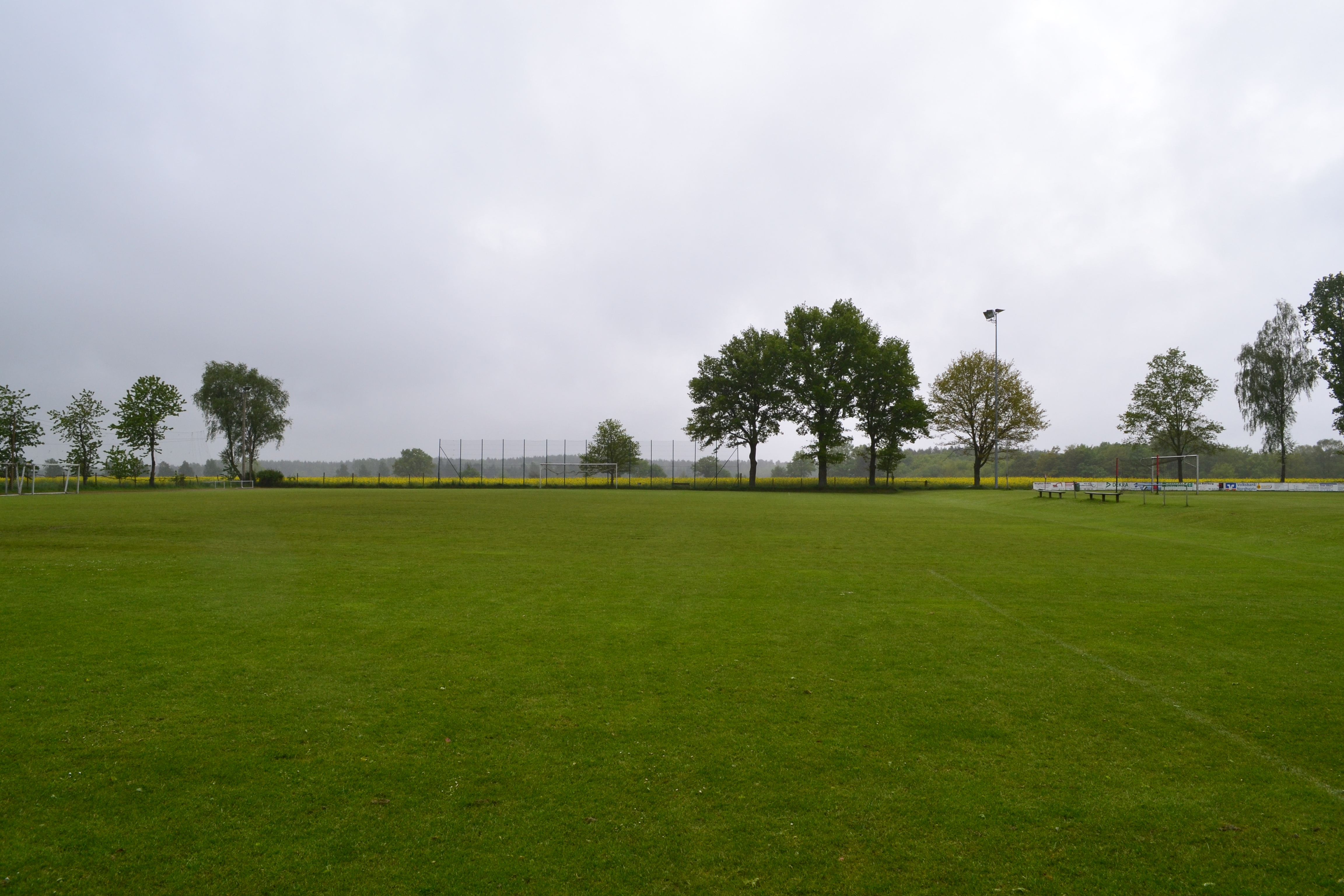 Sportplatz des MTV Egestorf.